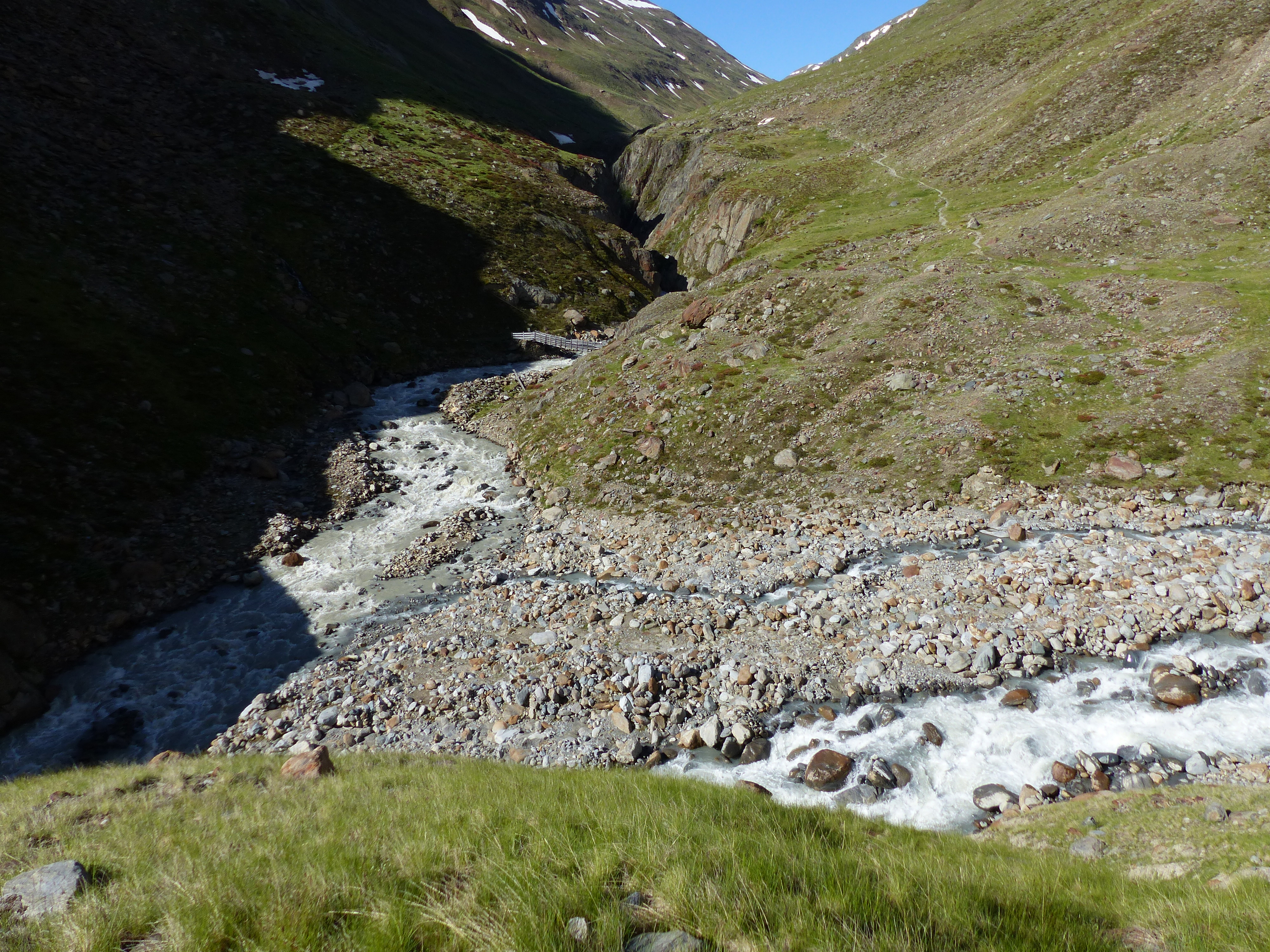 Mündung des Vernagtbachs in die Rofenache. Position des ehemaligen Rofener Eissees.